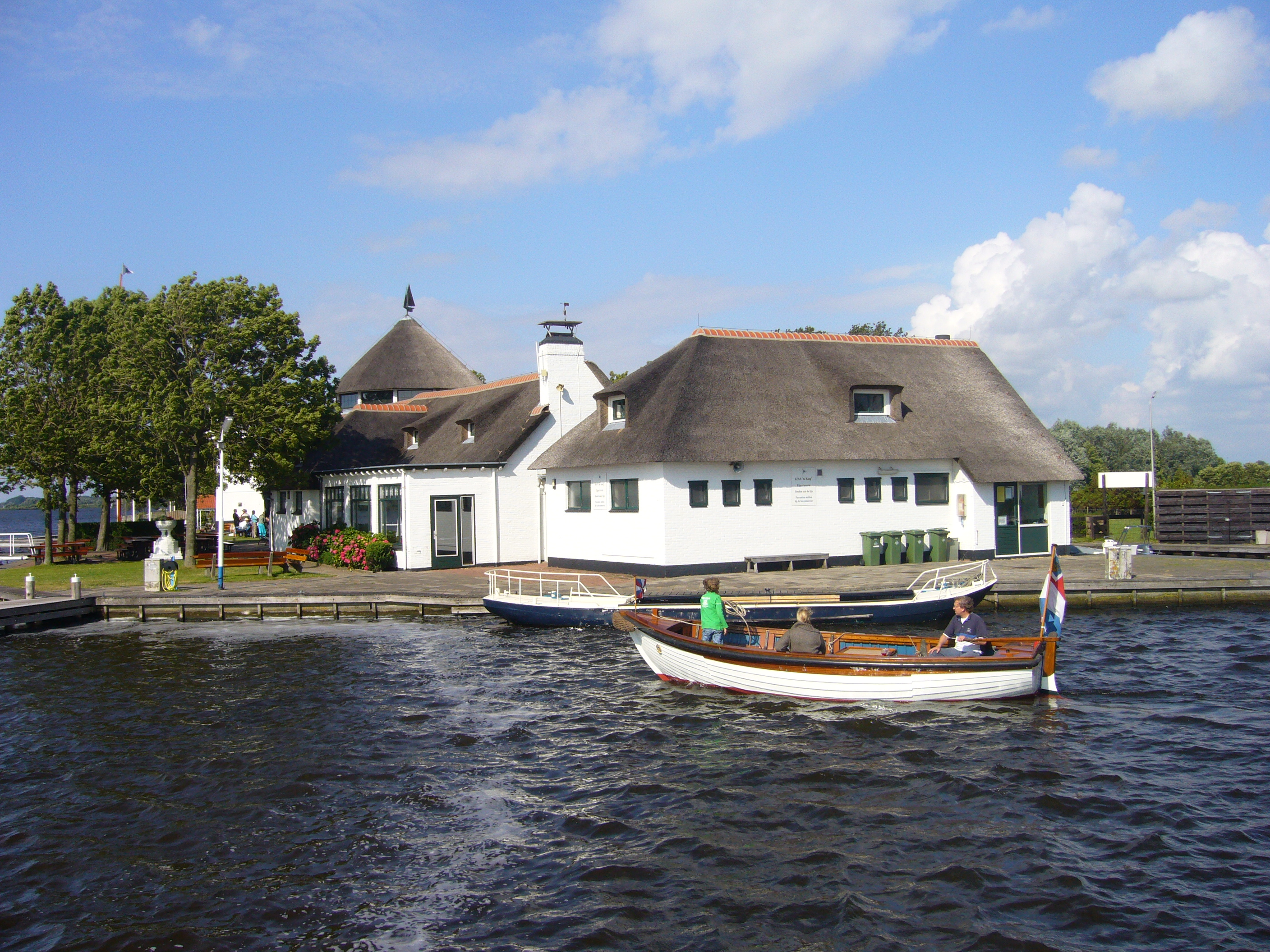 Kaagsociëteit aan de Kagerplassen